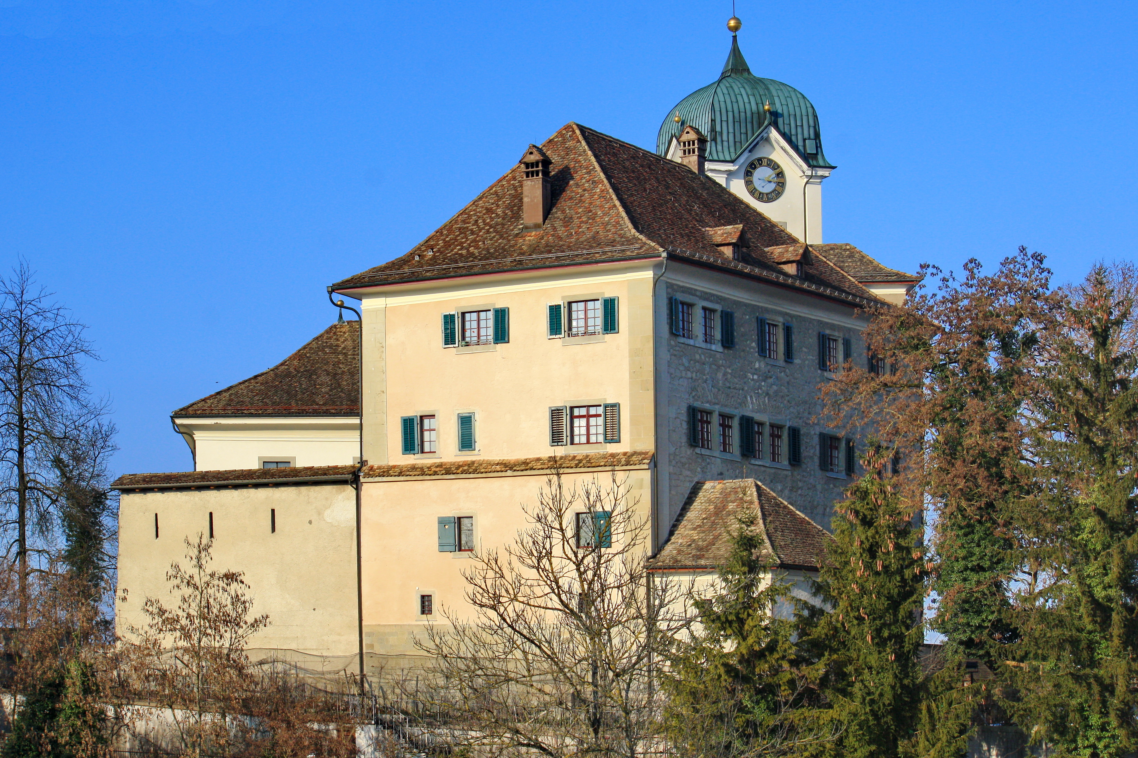 Schloss in Grüningen (Switzerland), Reformierte Kirche in the background.